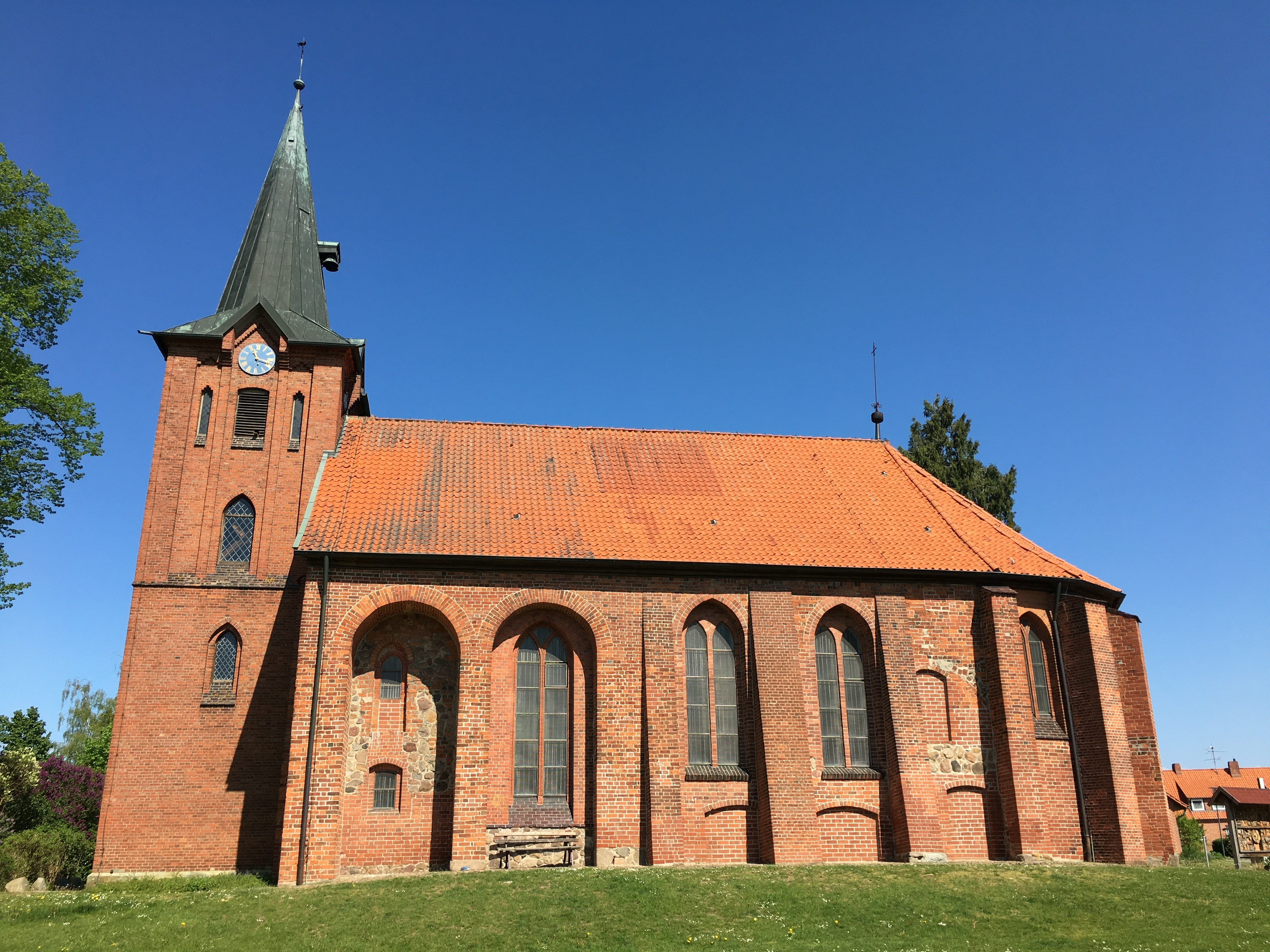 Blick von Süden auf die Mauritiuskirche in Altenmedingen